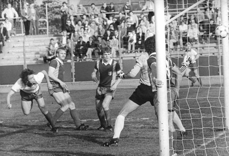 ADN-ZB-Oberst-9.5.87-mb-Berlin: Fußball-Oberliga- Der BFC Dynamo besiegte den 1. FC Magdeburg knapp mit 2:1 (2:1) Toren. Den Ausgleich für den BFC zum 1:1 erzielte Thomas Doll (l.) per Kopf. Die Magdeburger Akteure können nicht mehr eingreifen.